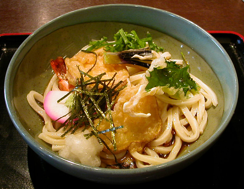 撮影者：小太刀 ころうどん。冷たいうどんです。濃いつゆに浸されています。名古屋周辺で夏に食べられるうどんです。